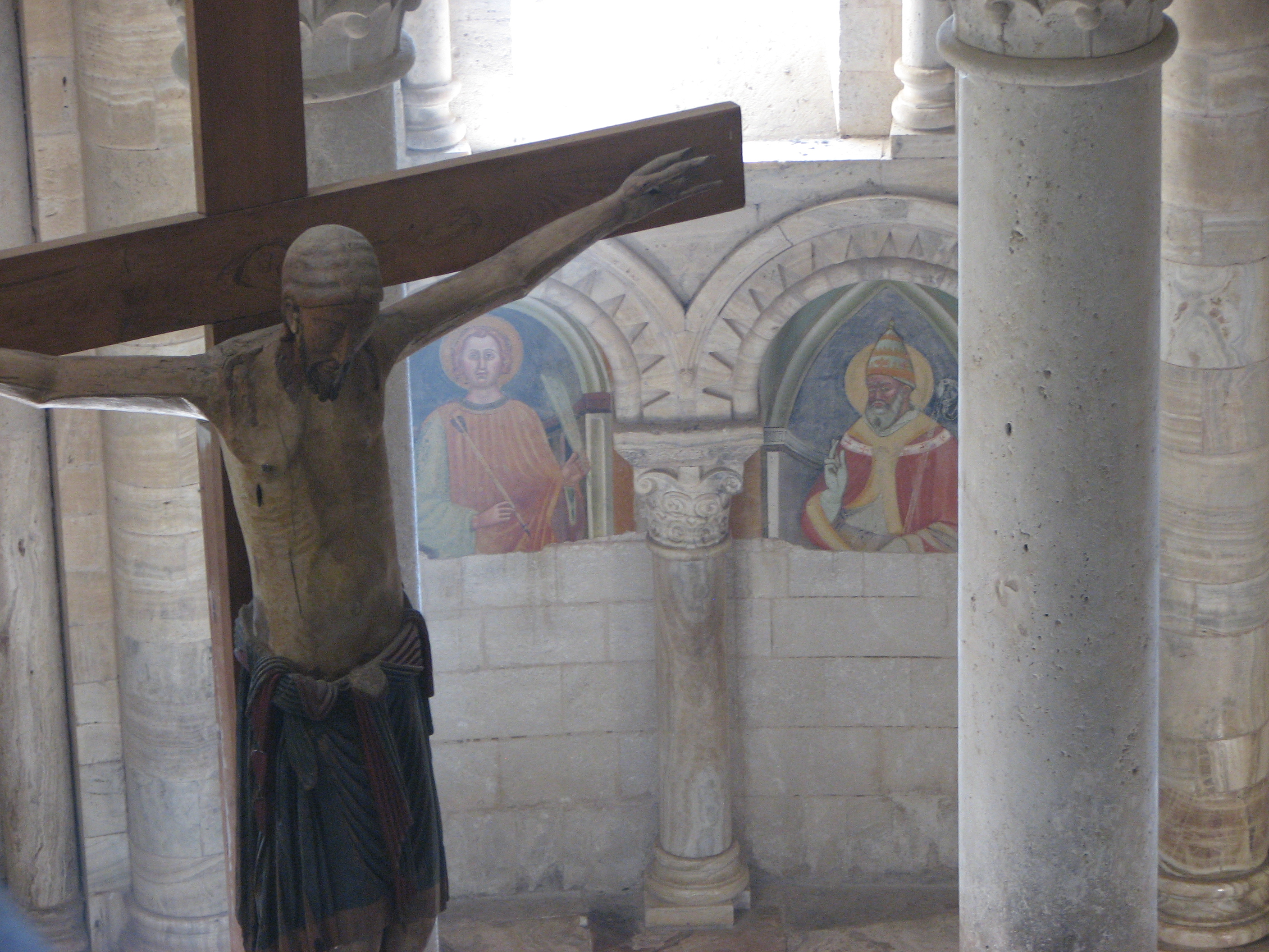 L'Abbazia di Sant'Antimo (Montalcino, Toscana, Italy) - Il crocifisso e gli affreschi visti dal matroneo